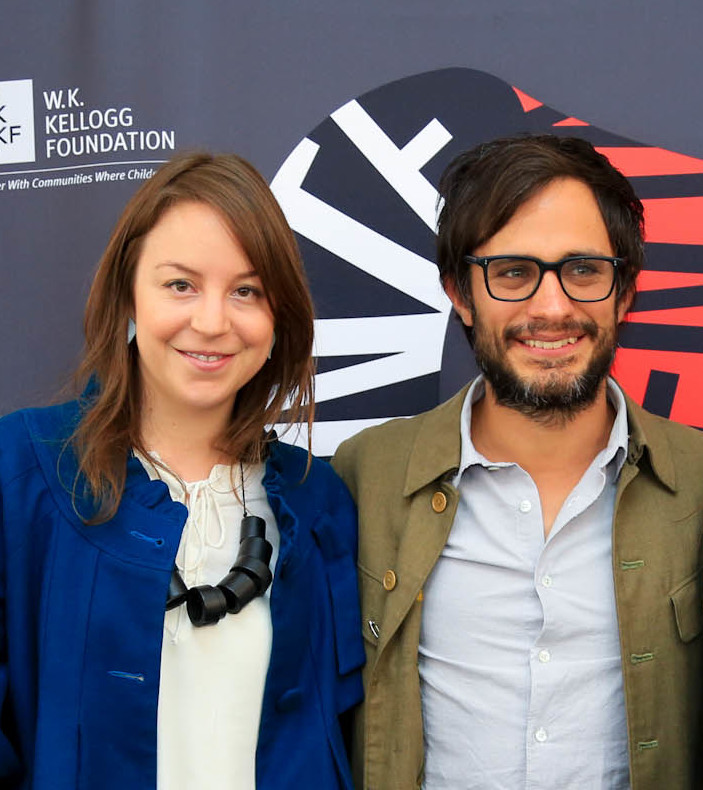 27 de Junio de 2013, Ciudad de México; con la presencia de Gael Garcia, Elena Fortes y Marie-Eve Parenteau. Foto por Karloz Byrnison.